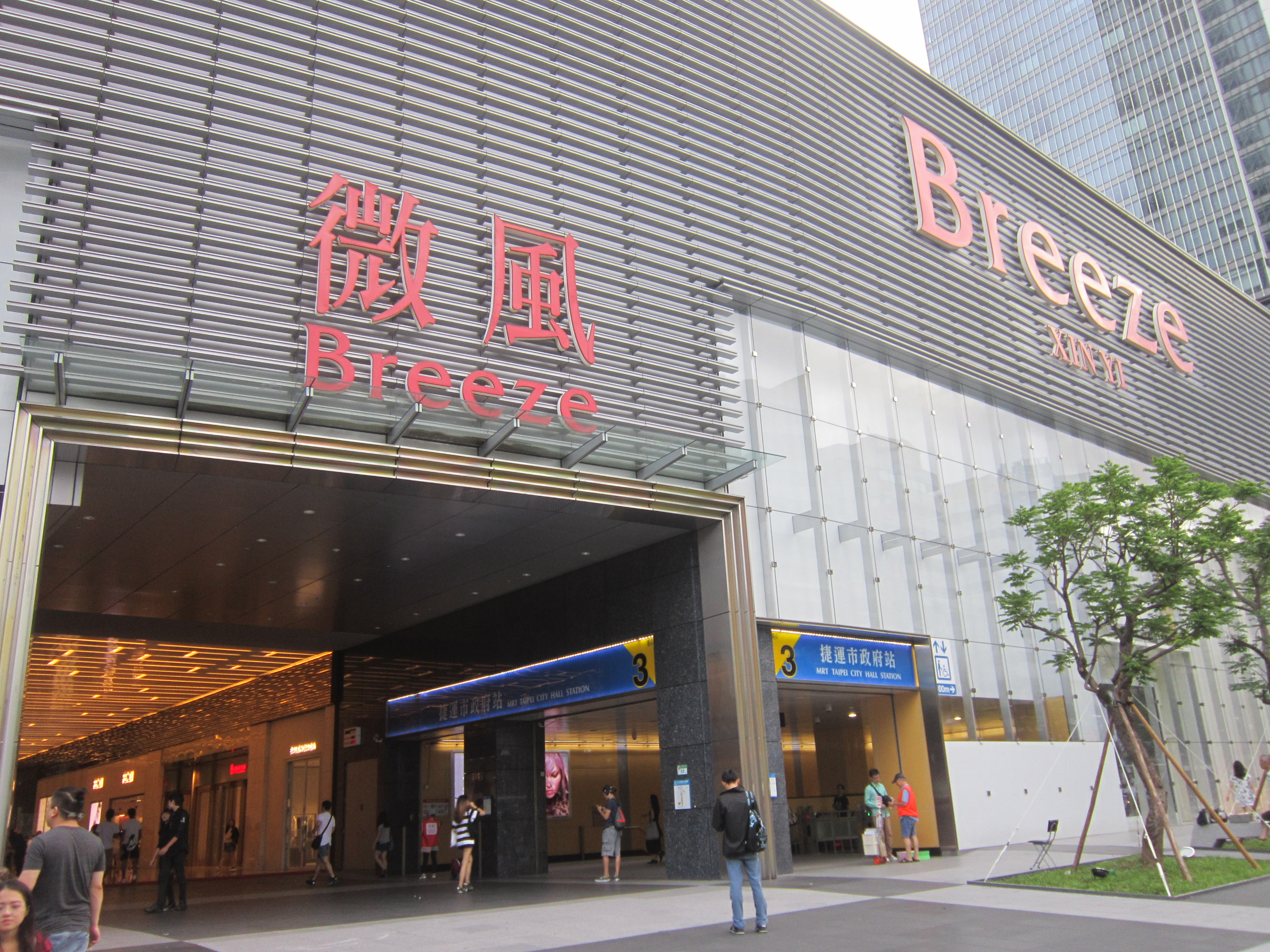 與微風信義共構的台北捷運市政府站3號出口。